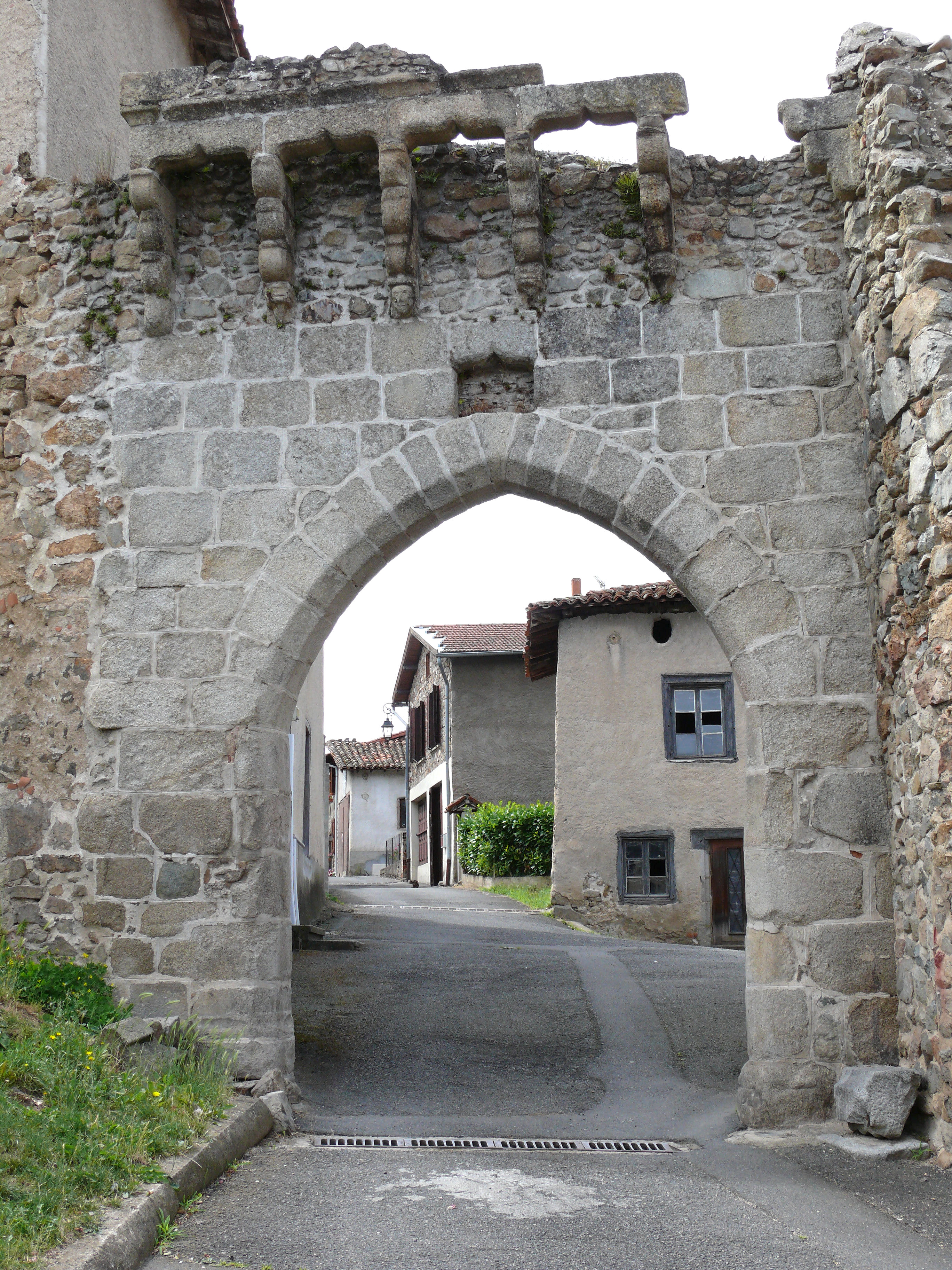 L'Hôpital-sous-Rochefort - Anciens remparts - Porte de Boën